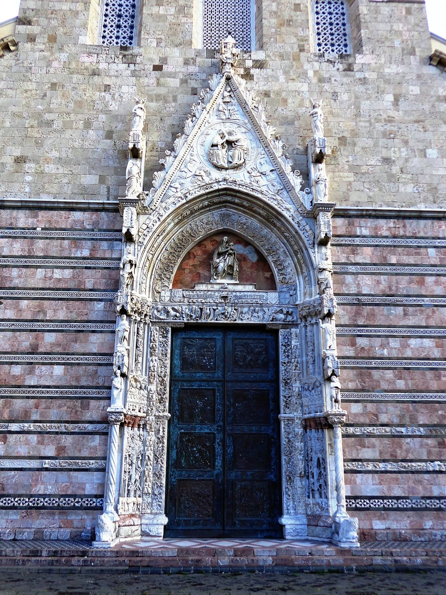 Portale duomo